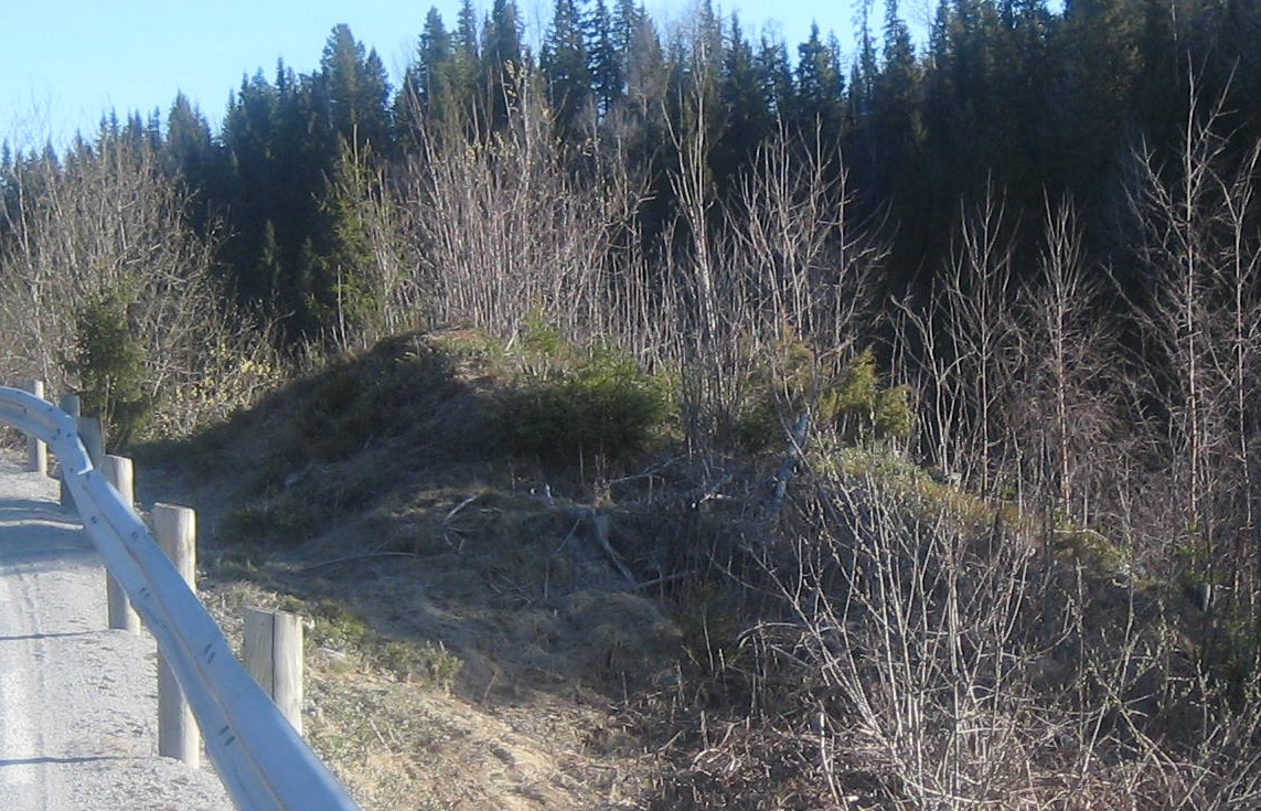 Gravhaugen på Nordre Lunde, Vest-Torpa